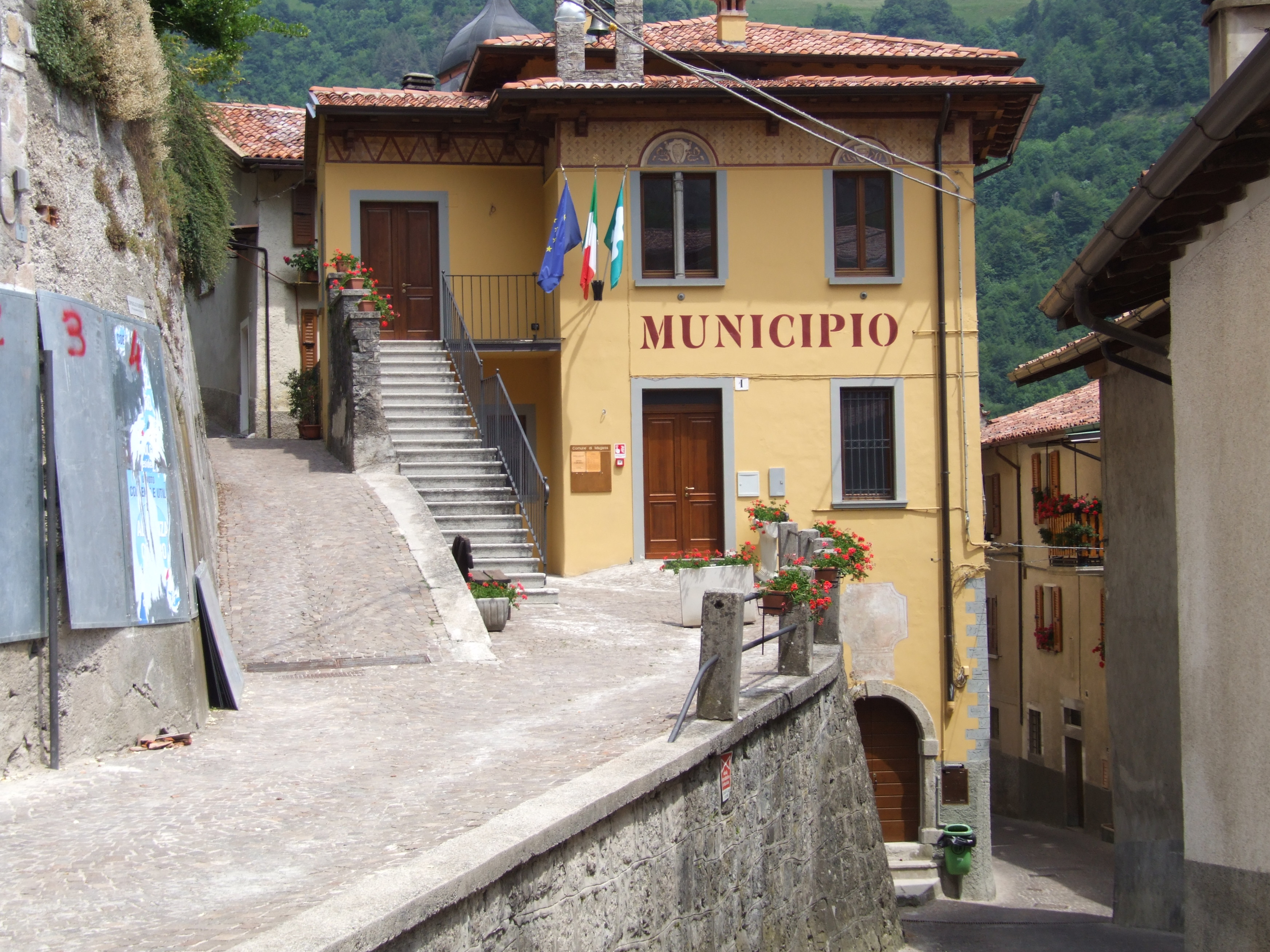 Municipio di Magasa in provincia di Brescia